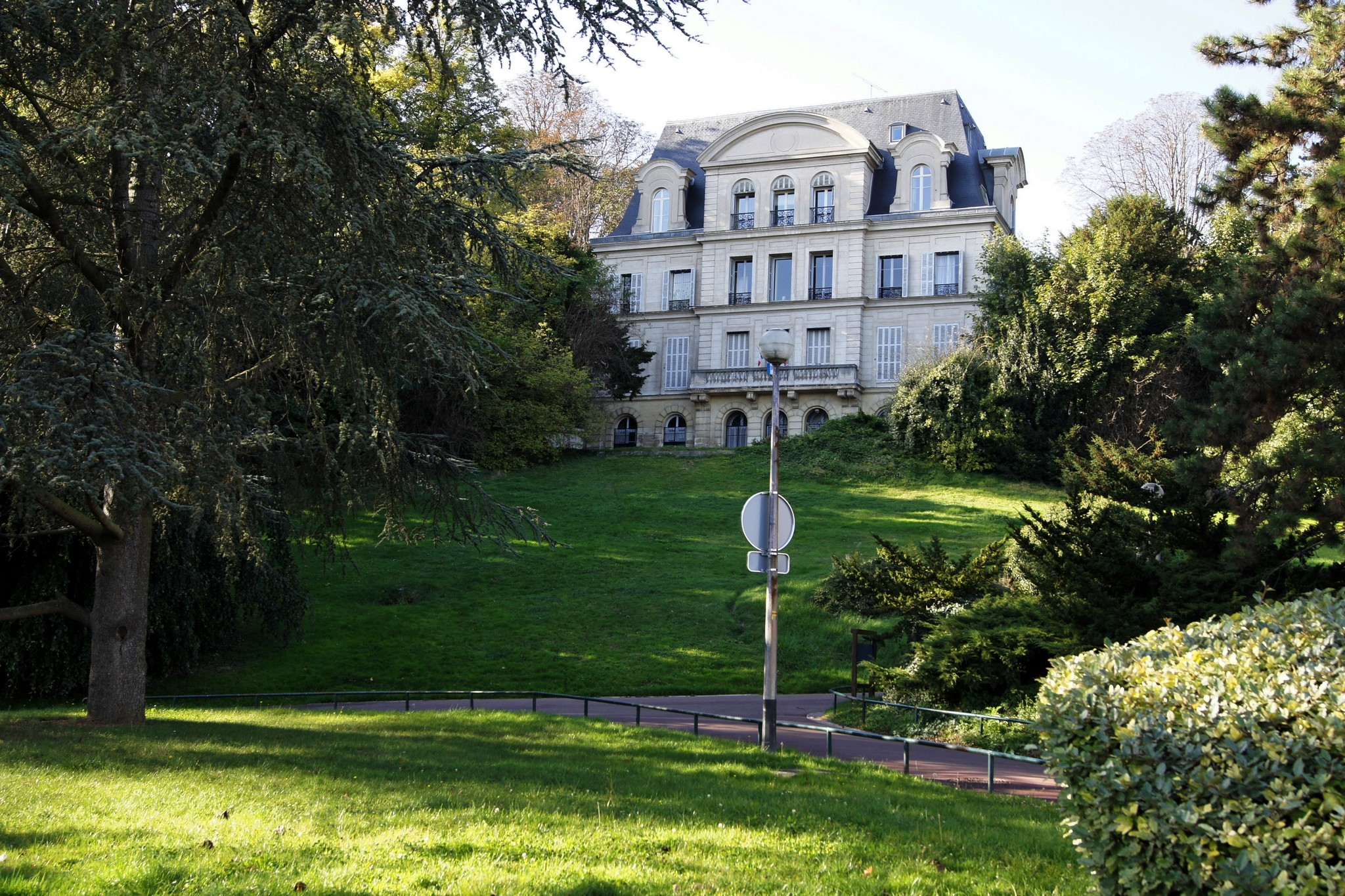 Mairie de Juvisy sur Orge vue de derrière.